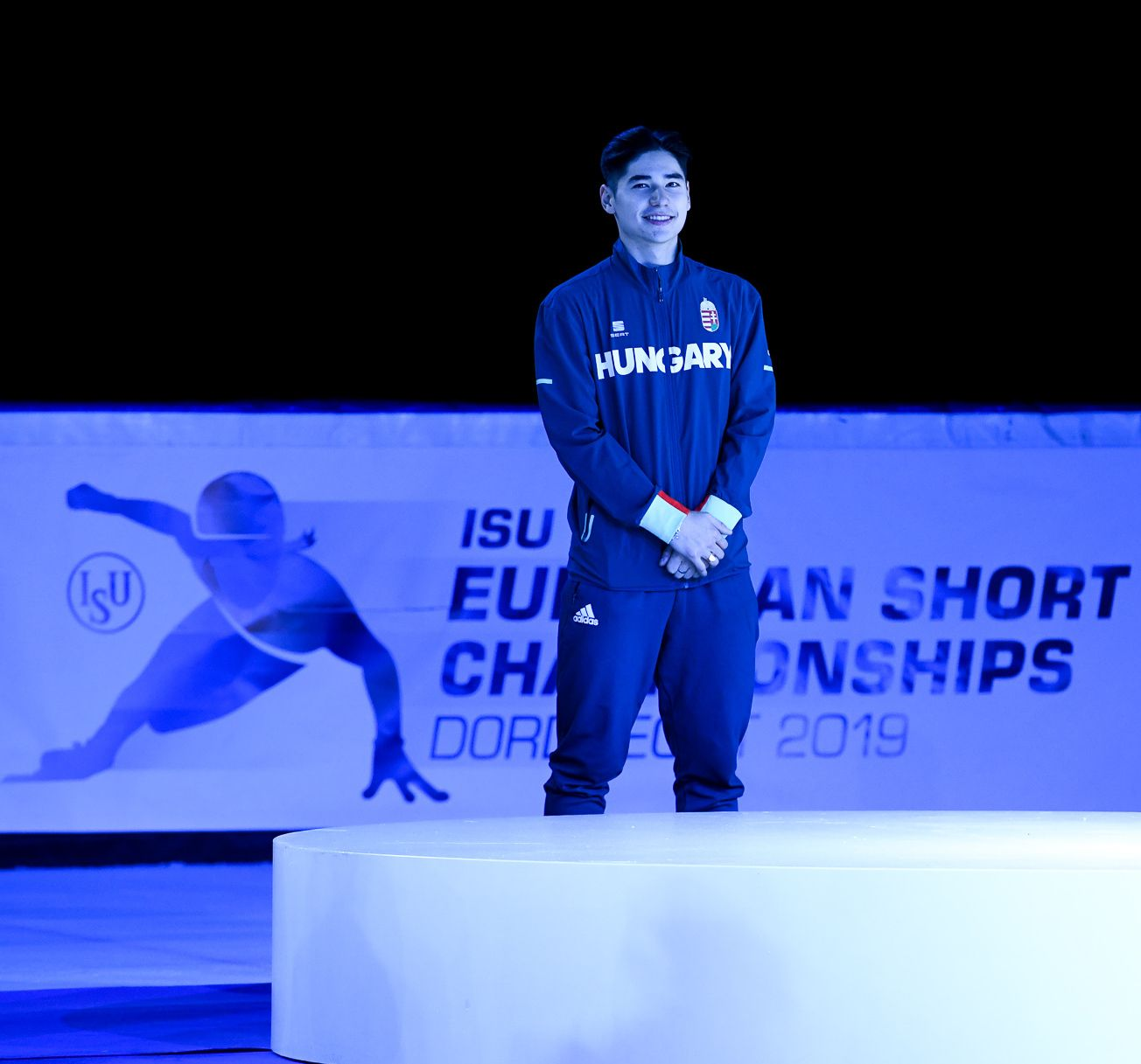 Liu Shaoang olimpiai- és Európa-bajnok magyar rövidpályás gyorskorcsolyázó a dordrechti Európa-bajnokság egyik eredményhirdetésén.